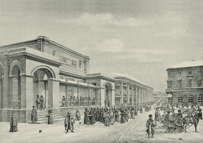 Биржа на Ильинке, 1839 г.